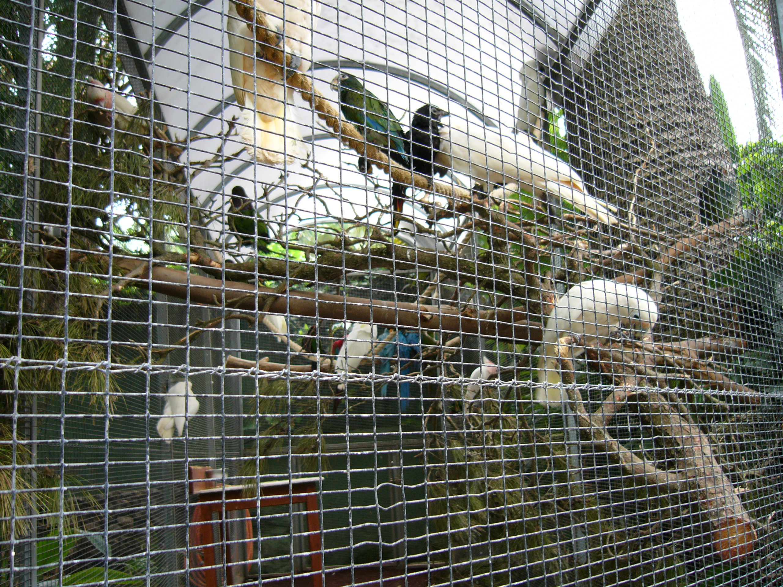 Tenerife: Loro Parque (Puerto de la Cruz) September 2005 Olaf A. Koch own picture